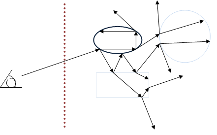 Template:Reflecções e refracções de um raio atraves dos objectos